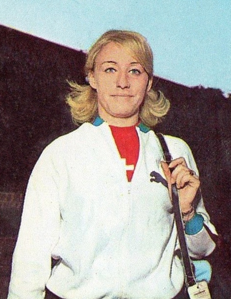 MUNCHEN/MONACO '72-PANINI-Figurina n.119- ANTENEN - SVIZZERA -PENTATHLON-Rec